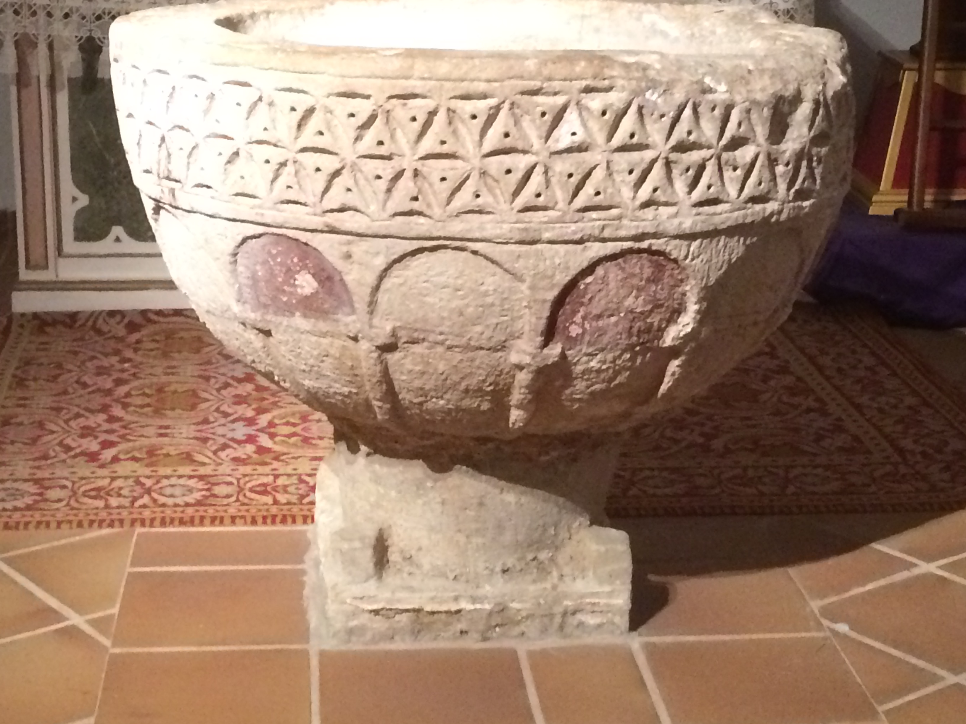 Pila de bautismo. Románico tardío, siglo XIII